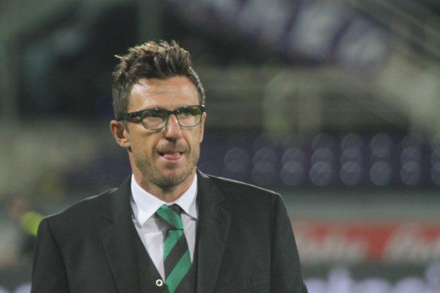 Eusebio Luca Di Francesco (Pescara, 8 settembre 1969) è un allenatore di calcio ed ex calciatore italiano, di ruolo centrocampista, nel 2014 allenatore del Sassuolo.